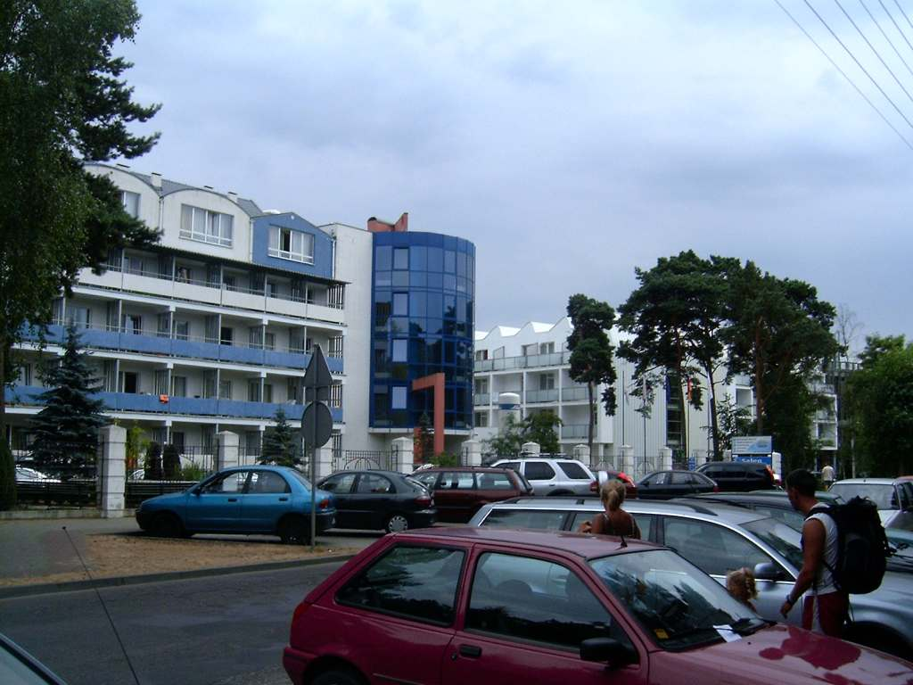 Pogorzelica - osrodki wczasowe